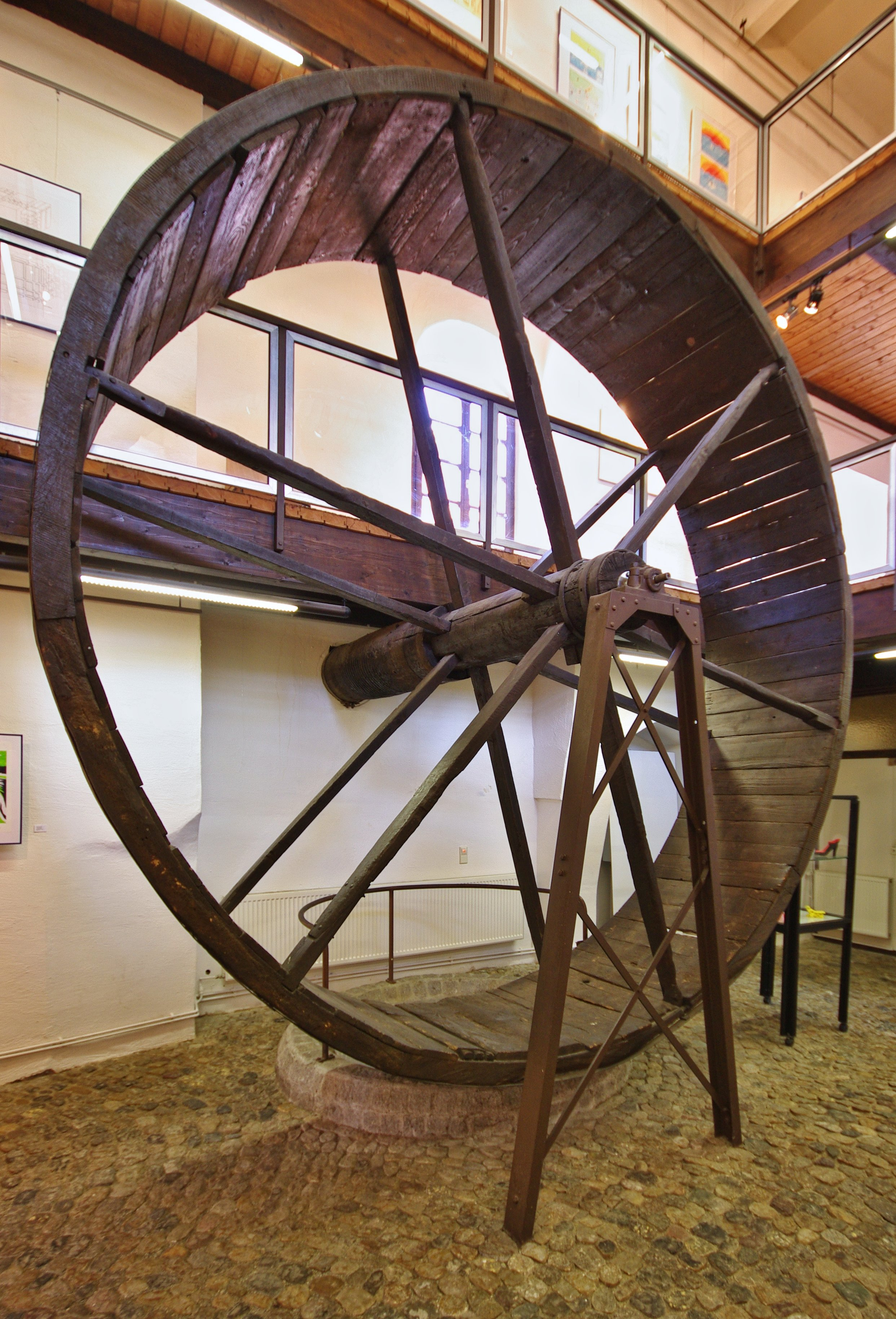 Bilder aus Breisach am Rhein Das Tretrad im Inneren des Radturms